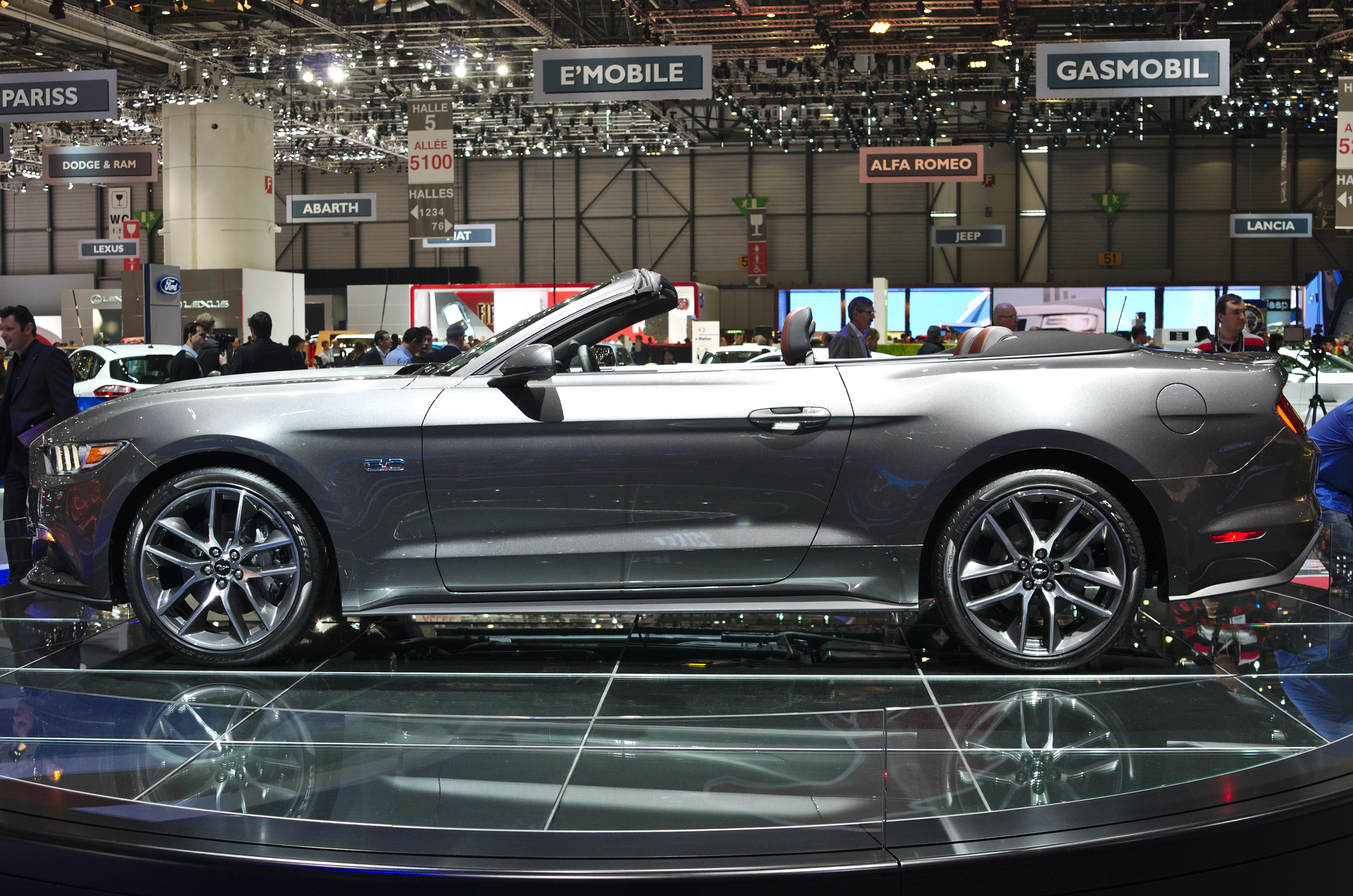 Salon de l'auto de Genève 2014 - 20140305 - Ford